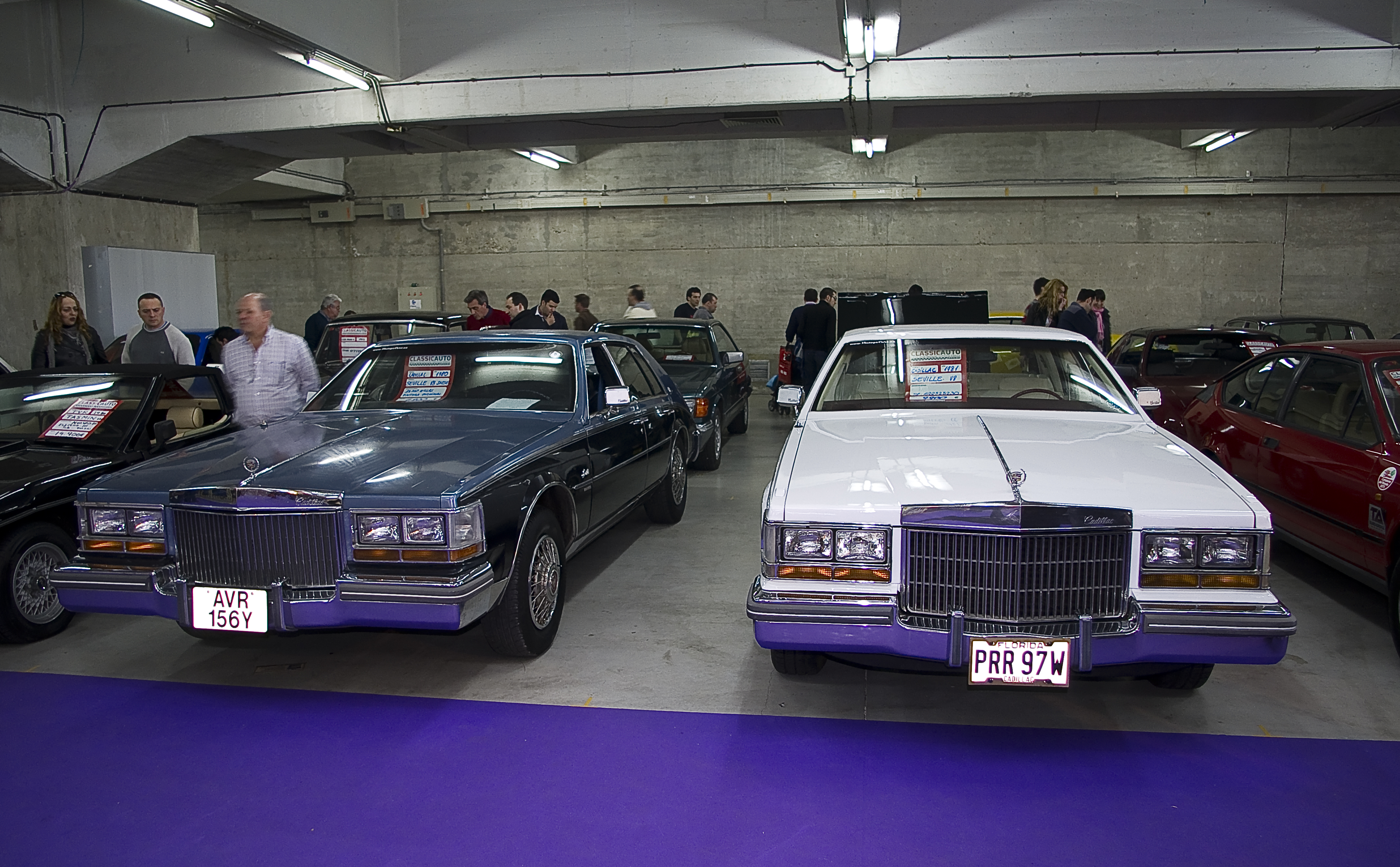 1980 & 1981 Cadillac Seville